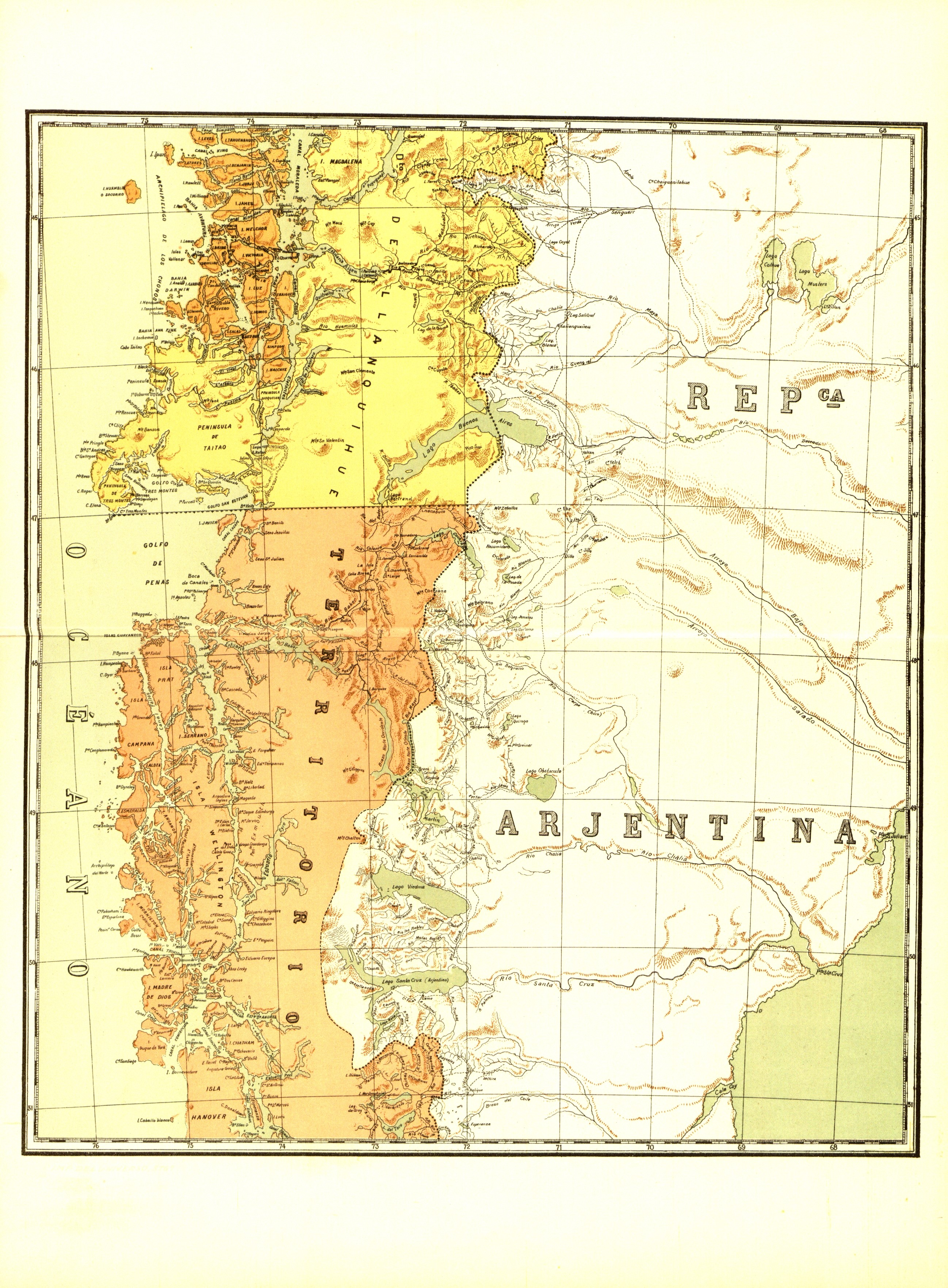 Mapa de Chile 1904 publicada por Carlos Tornero en Chile descripción física, política, social industrial y comercial de la república de Chile